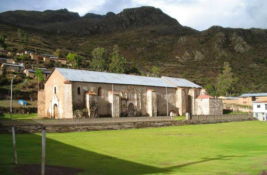 Quechua